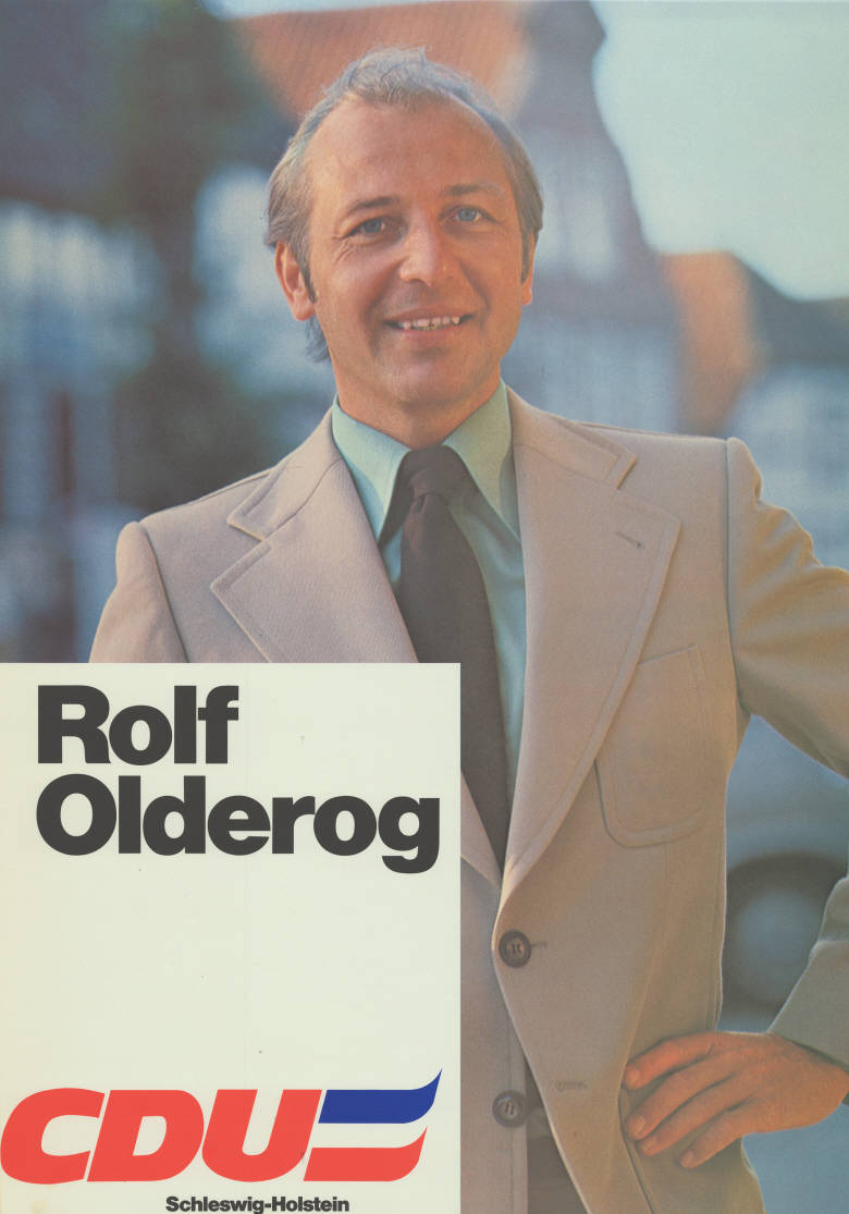 Rolf Olderog CDU Schleswig-Holstein Abbildung: Foto Plakatart: Kandidaten-/Personenplakat mit Porträt Auftraggeber: Verantw.: CDU Schleswig-Holstein Objekt-Signatur: 10-012 : 429 Bestand: Landtagswahlplakate Schleswig-Holstein (10-012) GliederungBestand10-18: Landtagswahlplakate Schleswig-Holstein (10-012) » Landtagswahl am 29.4.1979 » Ankündigungsplakate Lizenz: KAS/ACDP 10-012 : 429 CC-BY-SA 3.0 DE